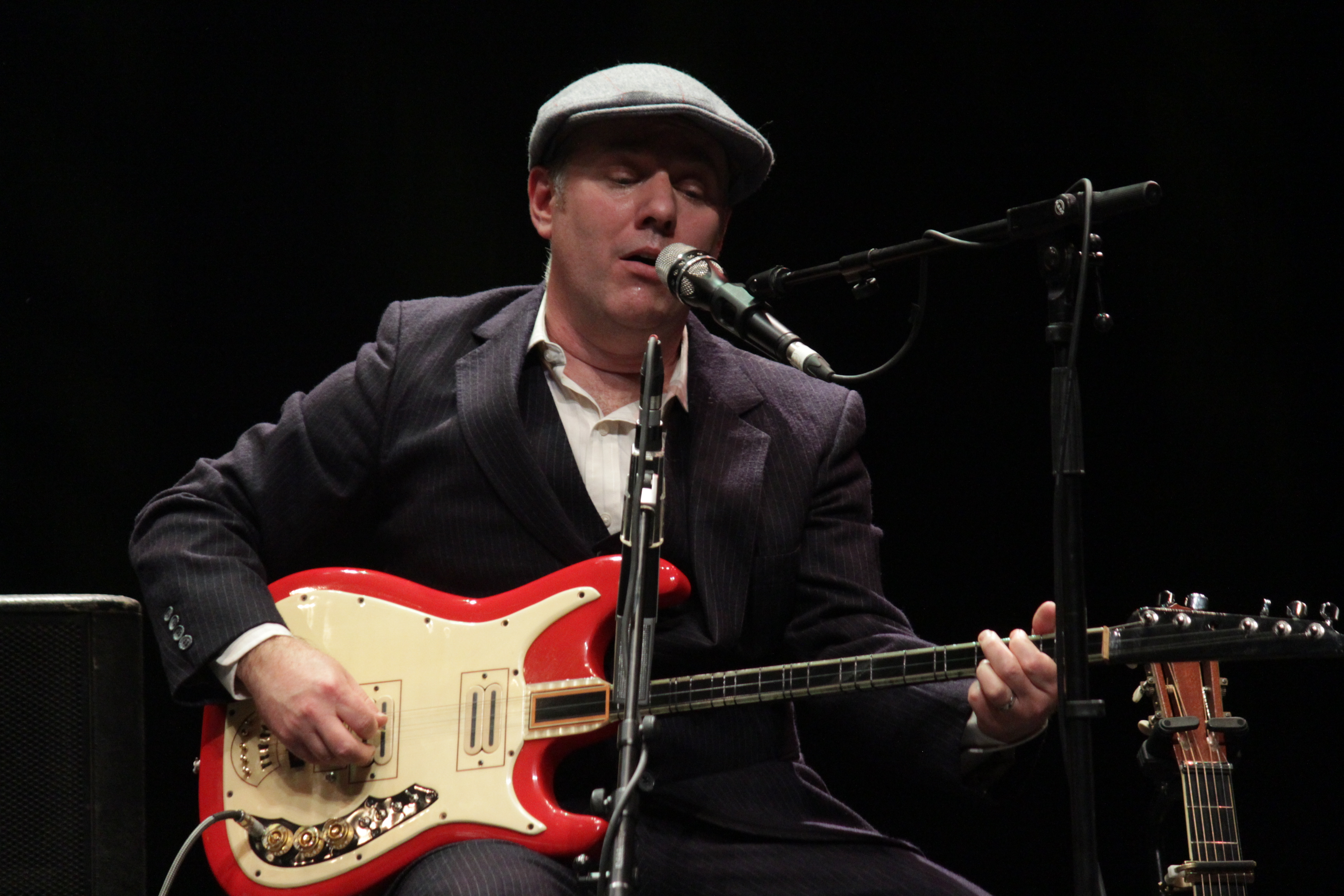 Jeff Lang sings Robert Johnson